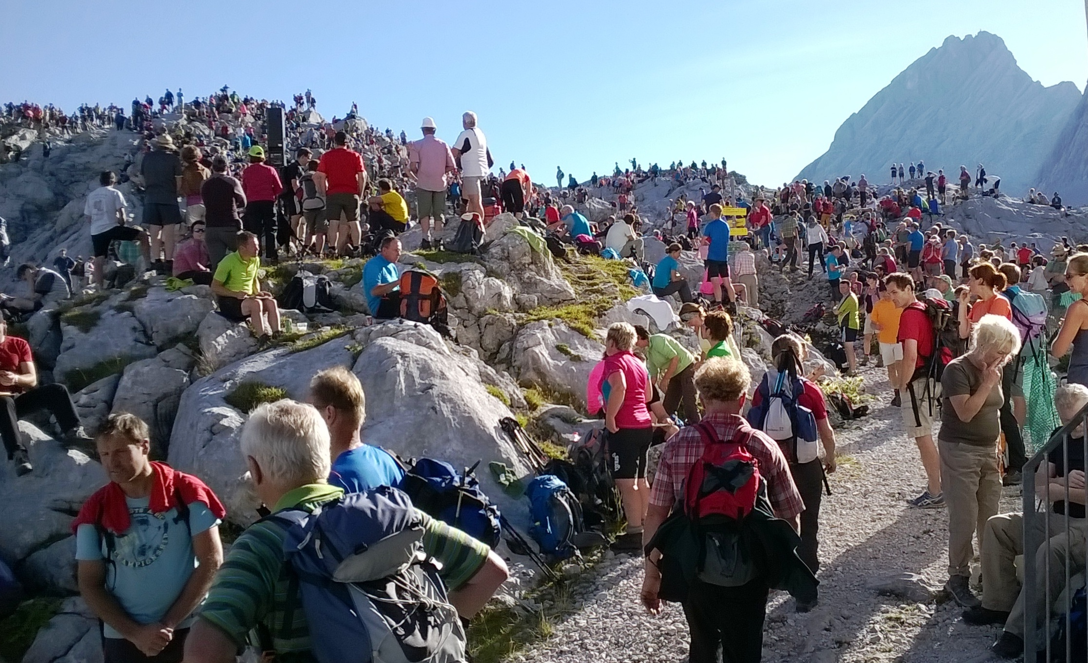 Bartholomä Wallfahrt am Steinernen Meer: Blick vom Riemannhaus zur Schönfeldspitze